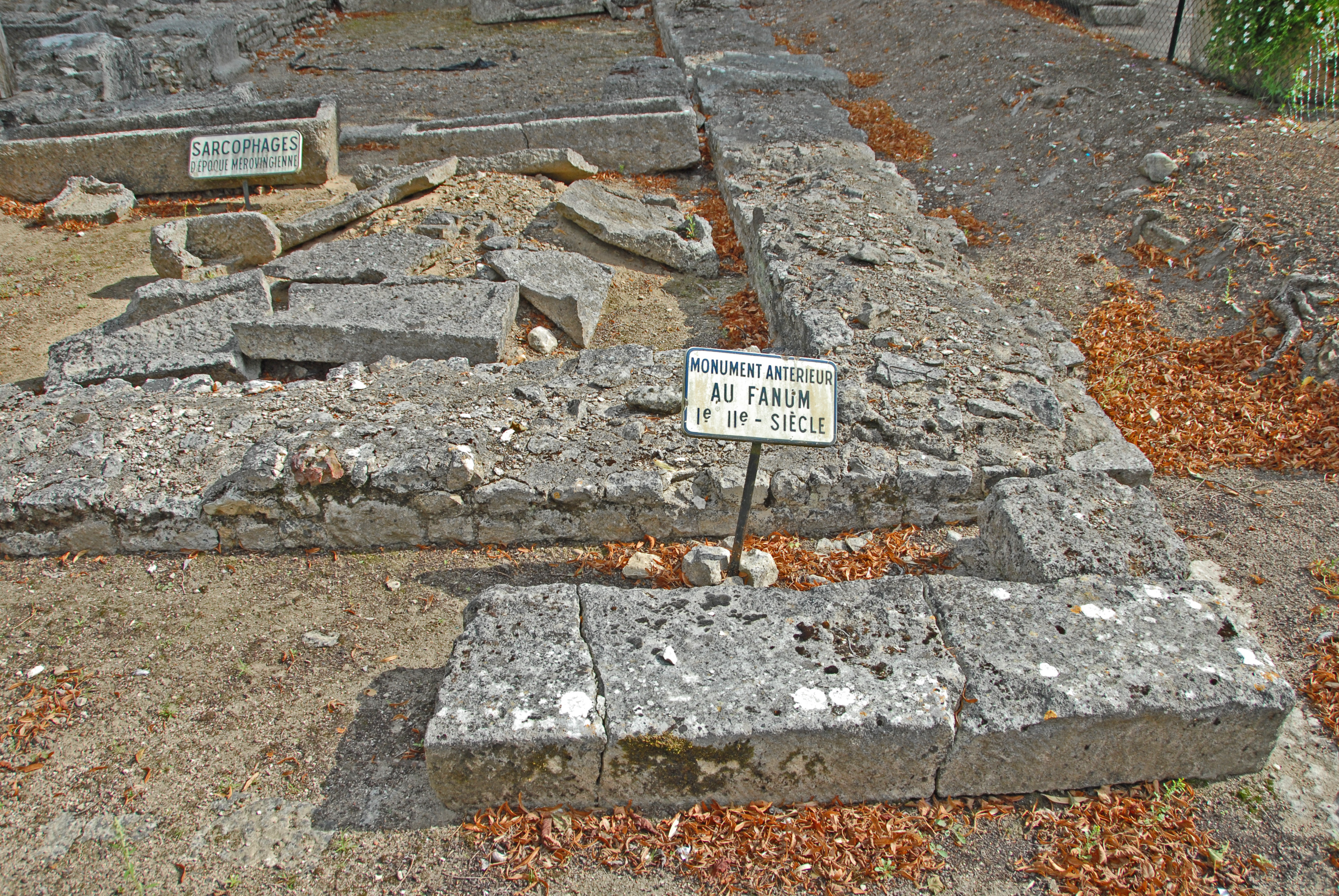 Civaux, Baptisterium, Eingangstreppe, Nordwestecke